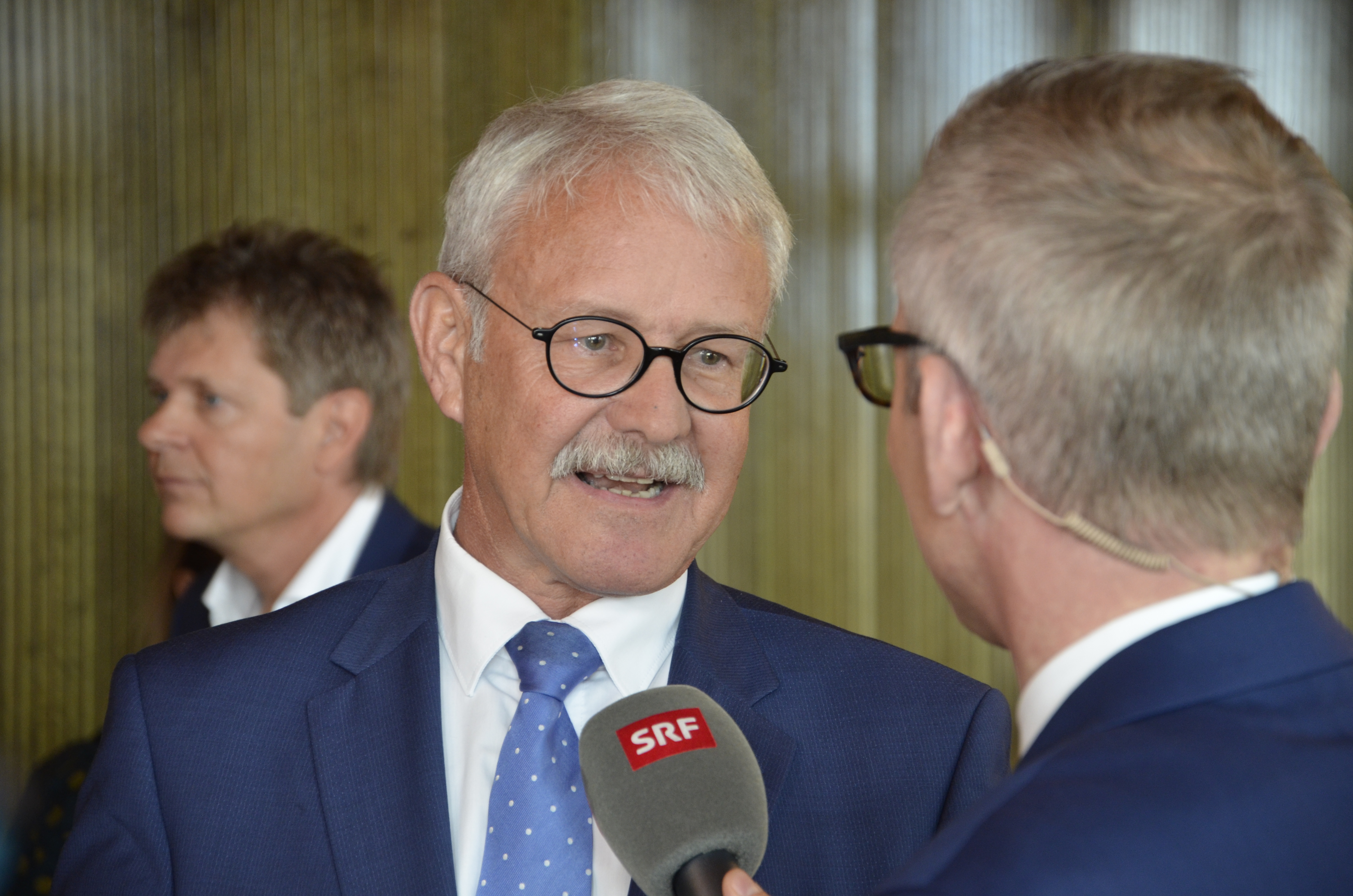 Schweizer Parlamentswahlen 2019: Wahltag im Bundeshaus, Ständerat Beat Vonlanthen (CVP) wird interviewt